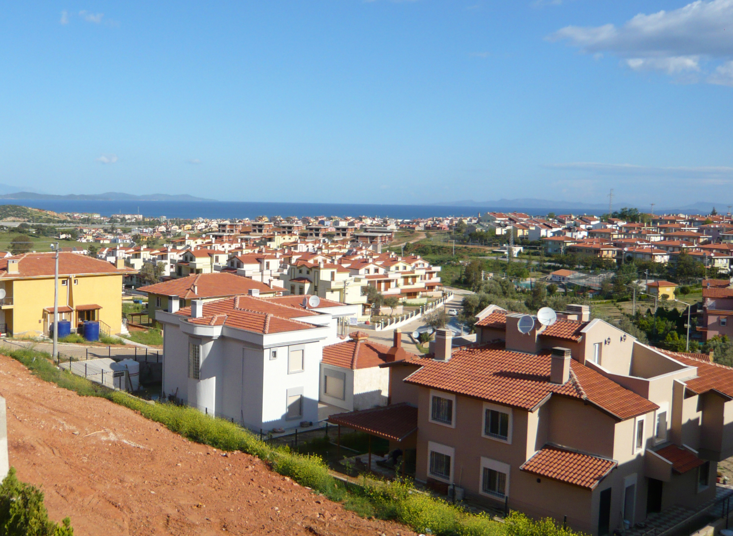 Güzelbahce near Izmir, Turkey